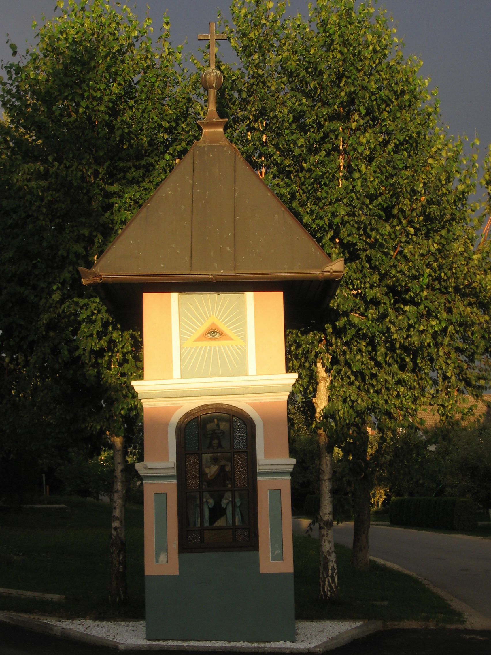 Breg pri Komendi: znamenje sredi vasi - igra svetlobe po poletni nevihti